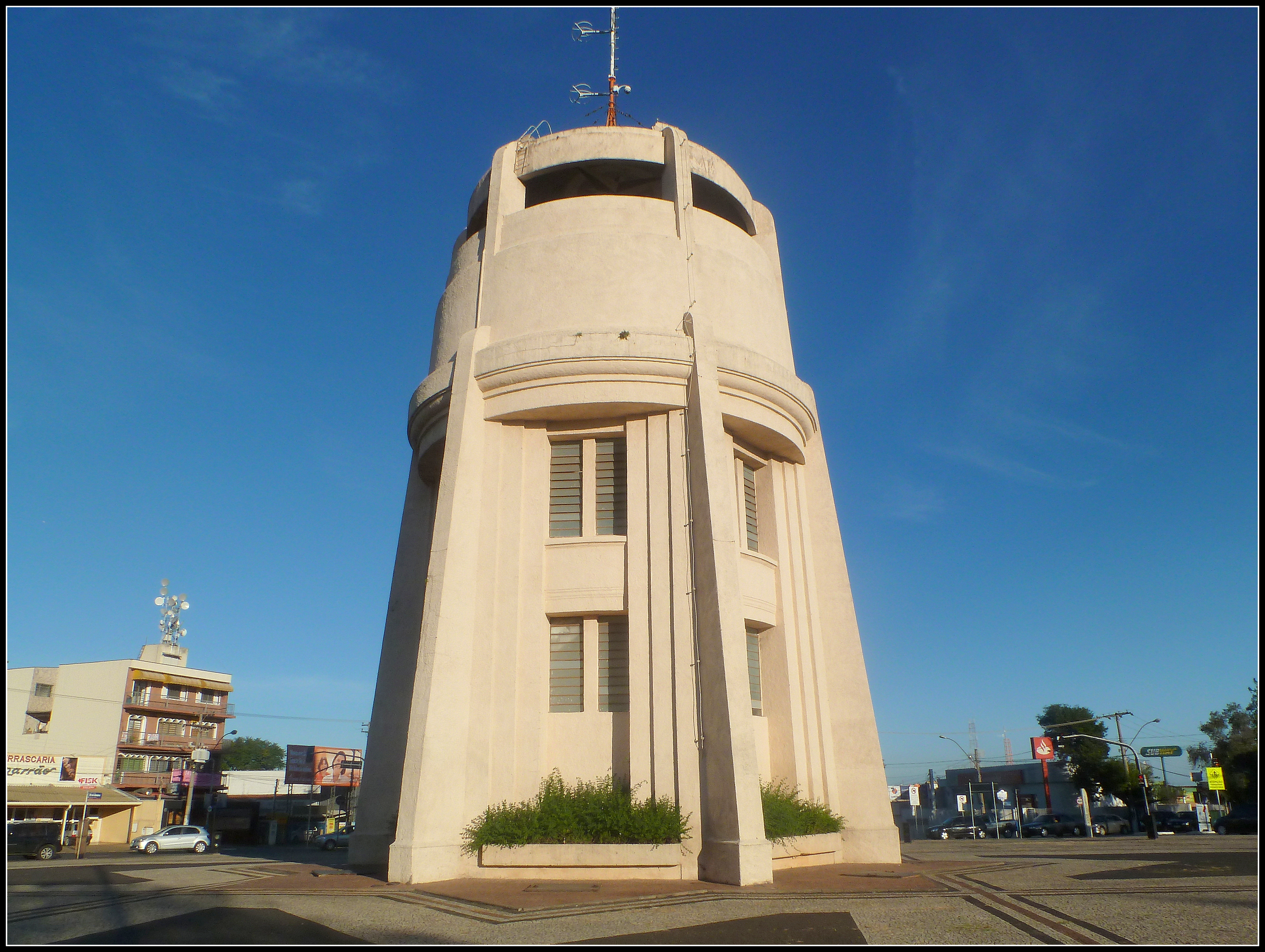 Torre do Castelo